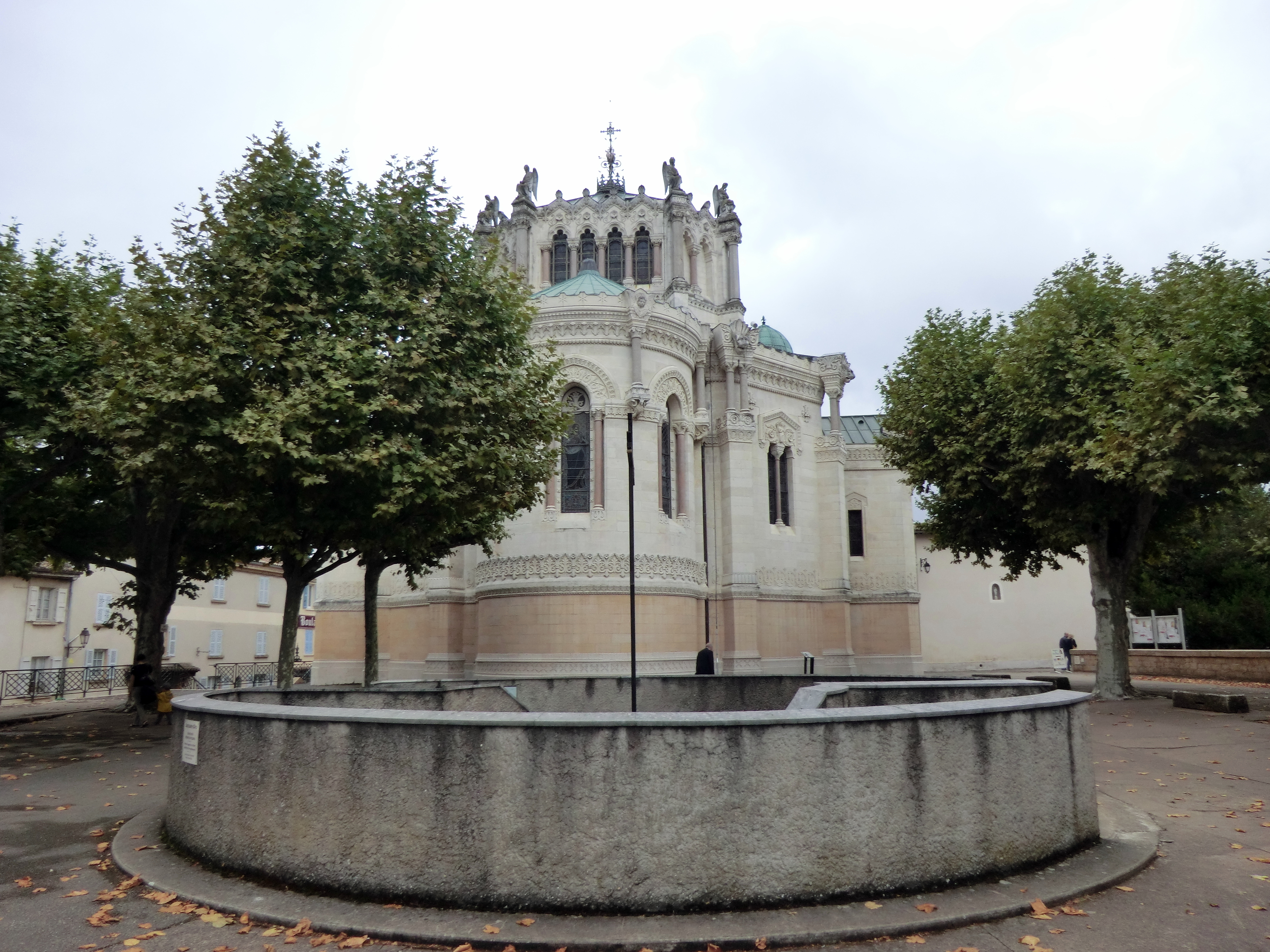 Côté Est de la basilique d'Ars. Au premier plan, l'entrée de l'église souterraine de Notre-Dame-de-la-Miséricorde. .